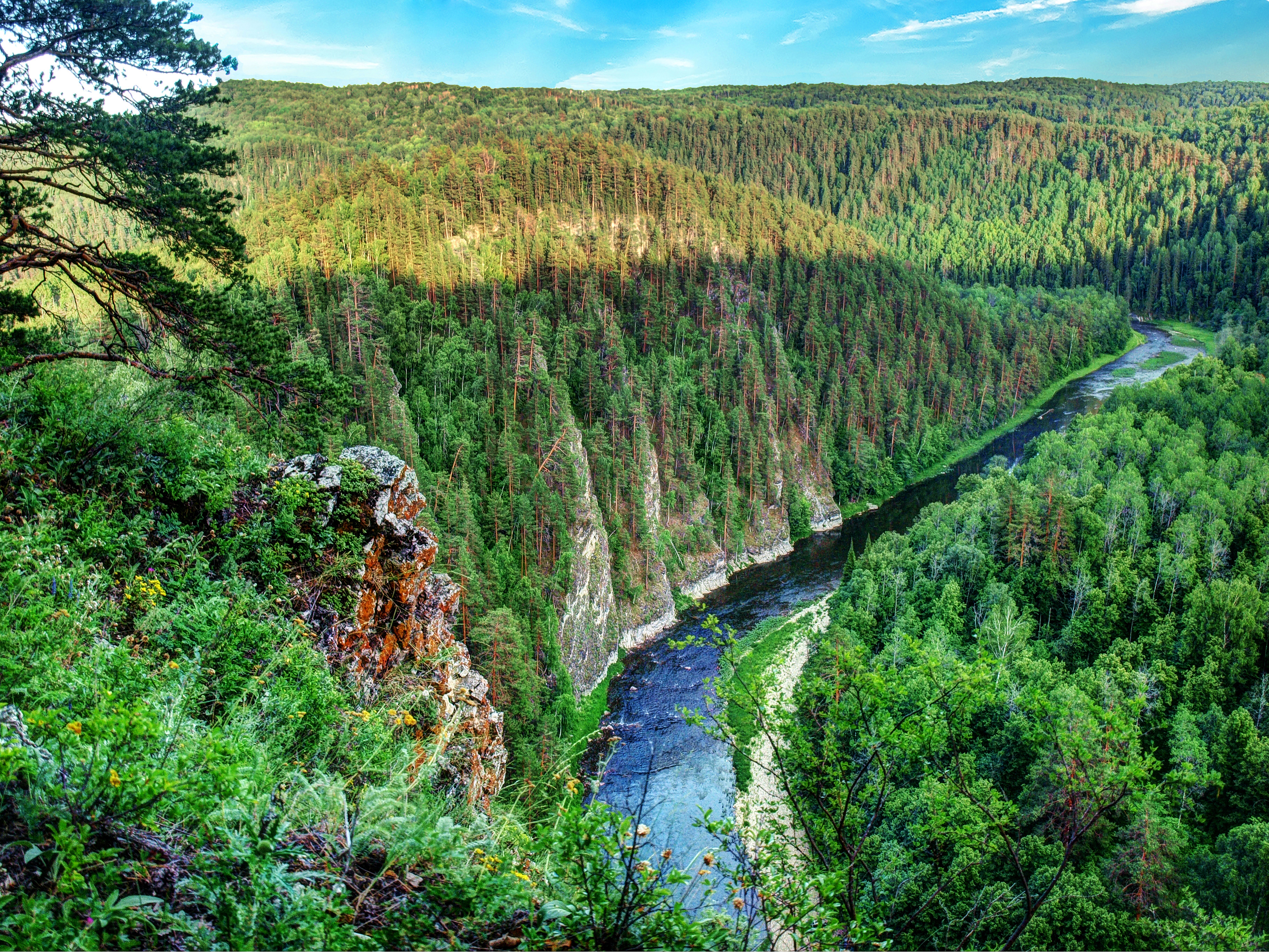 Южно-Уральский заповедник, Белорецкий район This image is related to the protected area of Russia number 0200073